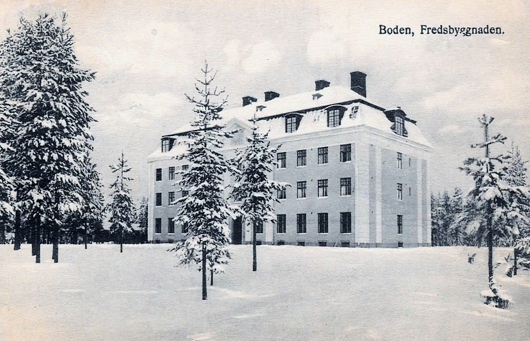 Fortifikationshuset på Intendenturvägen 4, Boden. Byggnaden är uppförd i samma stil som de kanslihus som uppfördes efter 1901 års härordnings typritningar för infanterietablissemang, vilket tydligt ses genom byggnadens mittfront och vapenprydda tympanon. Byggnaden är uppförd i tre våningar med källare och inredd vind. Fastigheten verkade som kansli för Övre Norrlands militärområdes byggnadskontor (ByÖN), Övre Norra byggnadsområdet (FortF/ÖN) och senare Fortifikationsverket.